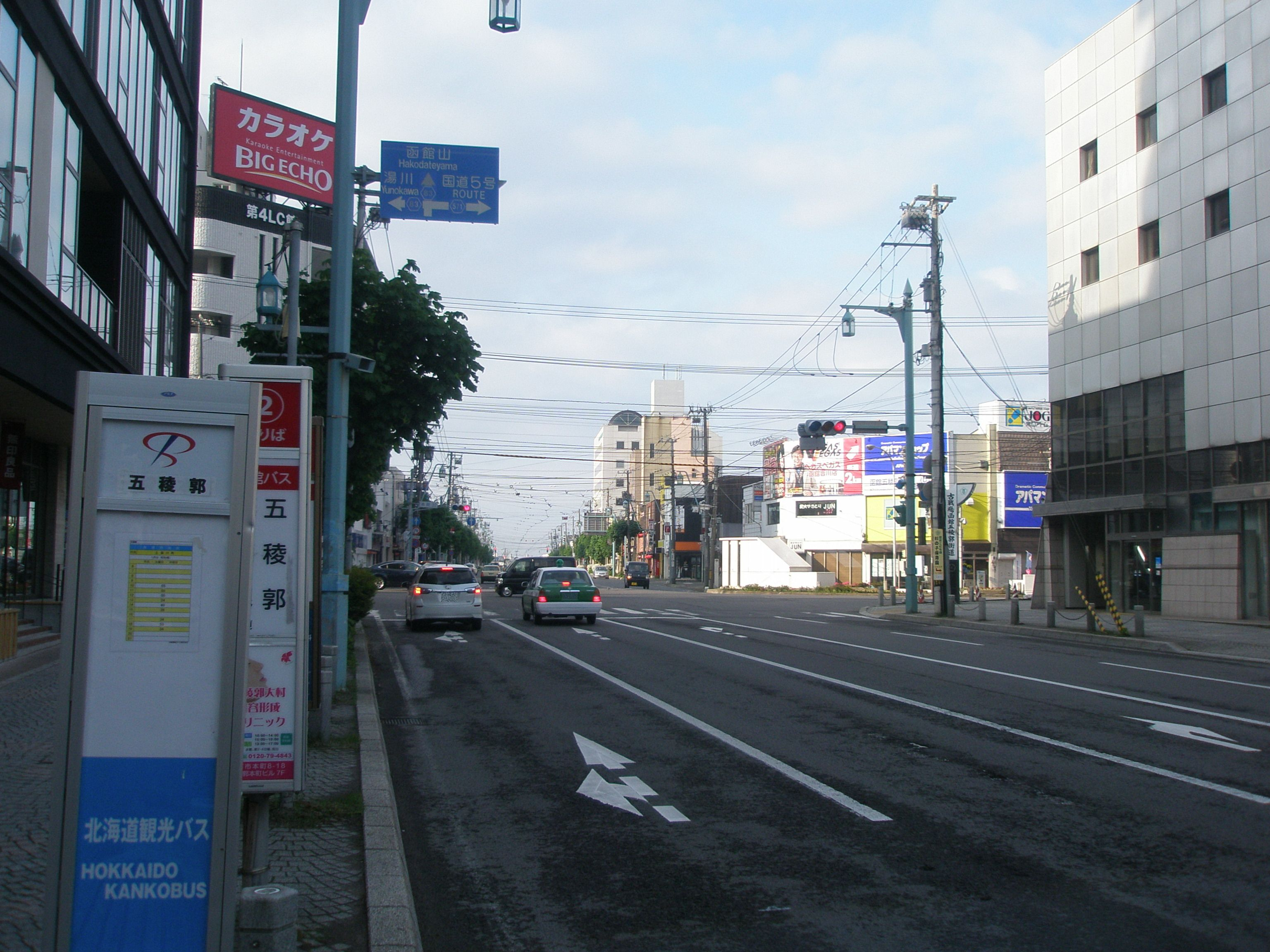 北海道道571号五稜郭公園線・函館市本町交差点（北海道道83号函館南茅部線重複）を起点側から見る